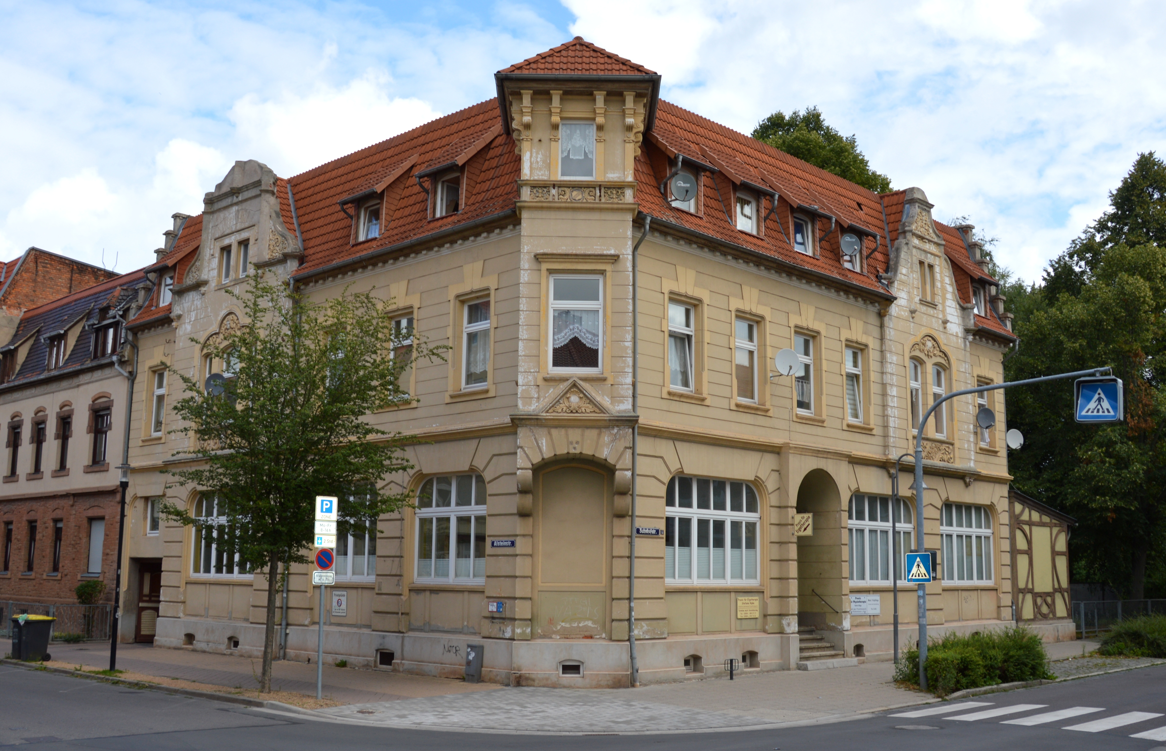 Haus Bahnhofstraße 4 in Haldensleben